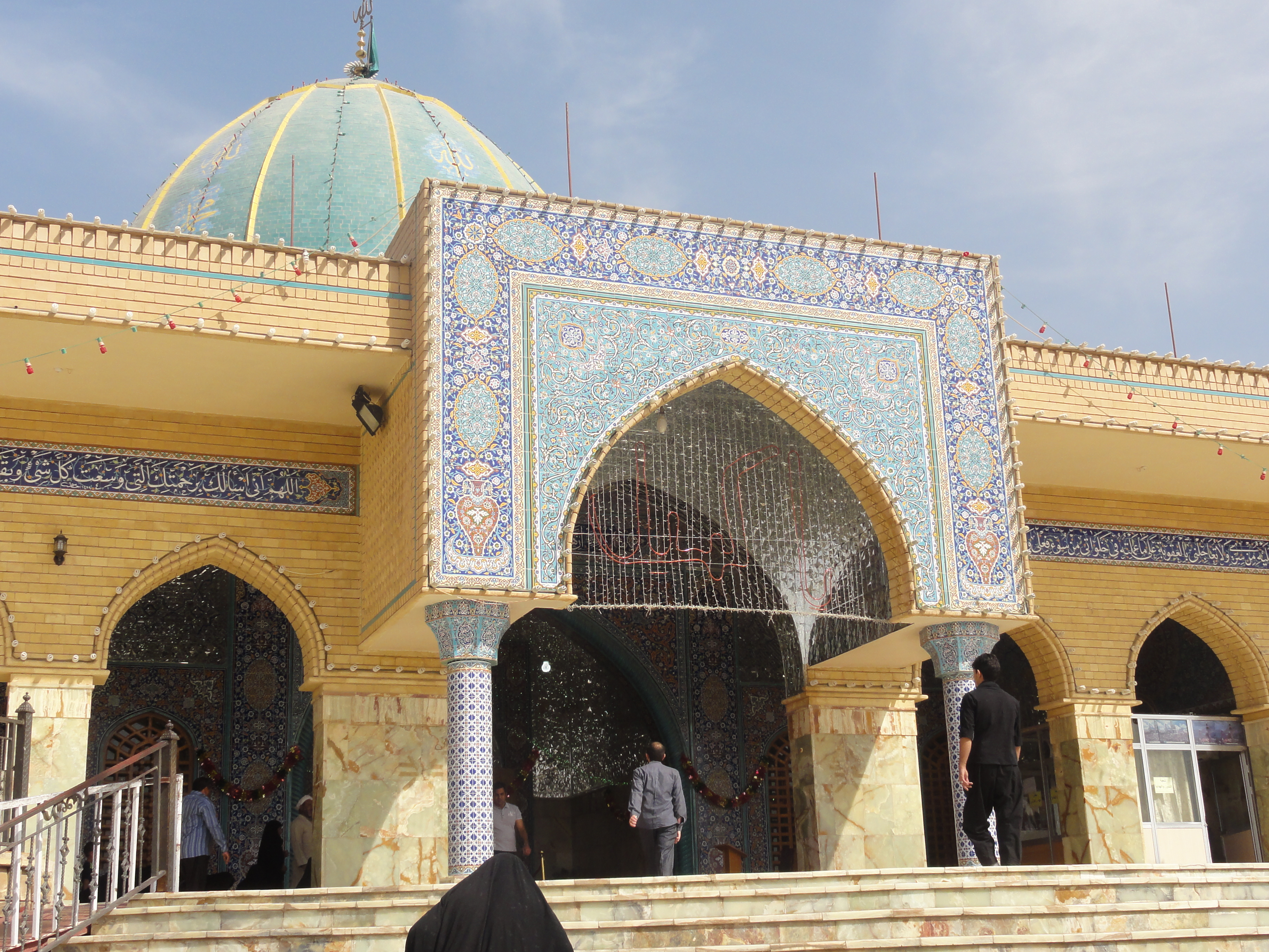 Kumayl ibn Ziyad Shrine in Hannanah, Najaf, Iraq